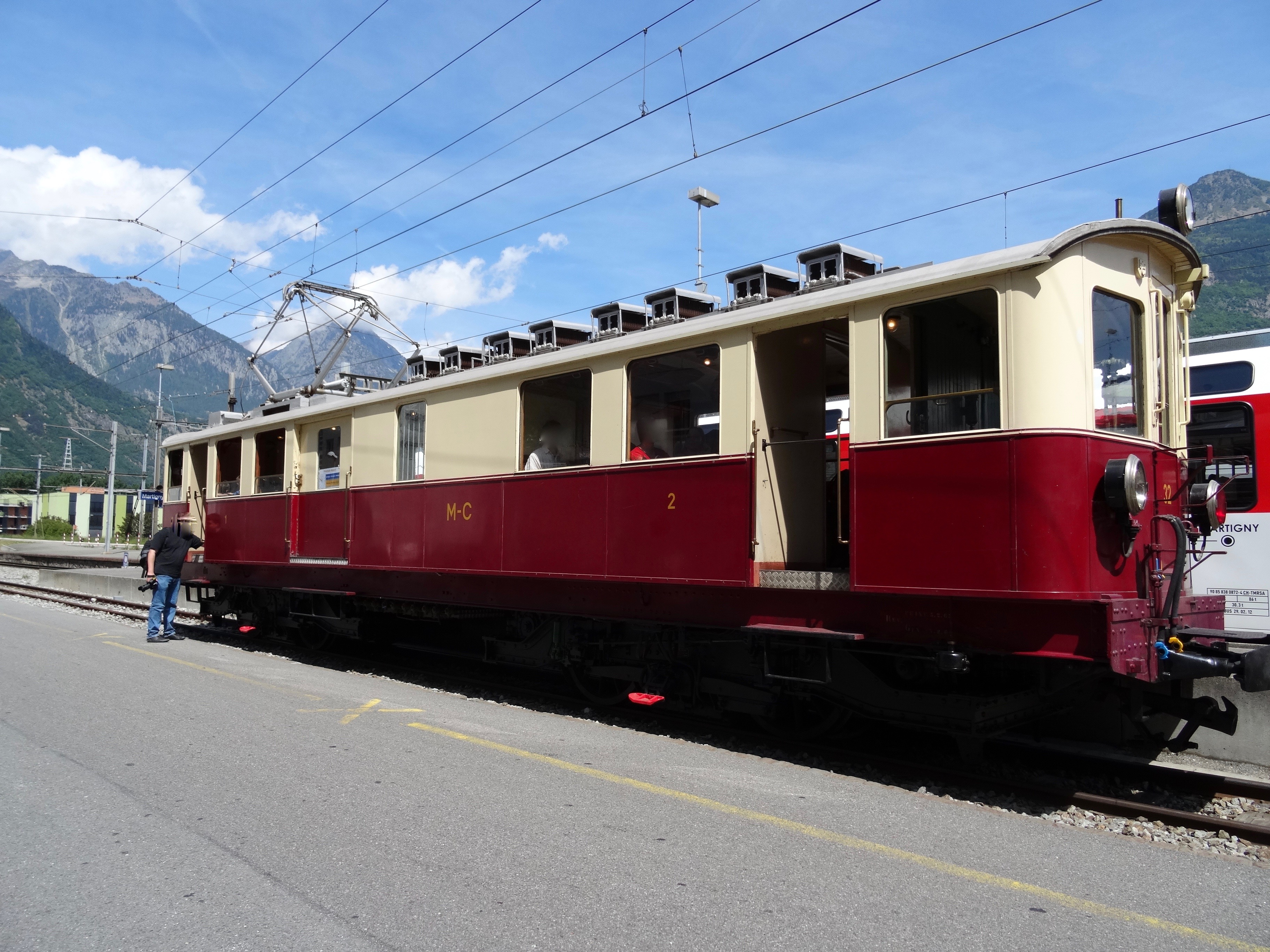 L'automotrice 32 du Martigny-Châtelard à Martigny lors des journées portes ouvertes du Train Nostalgique du Trient